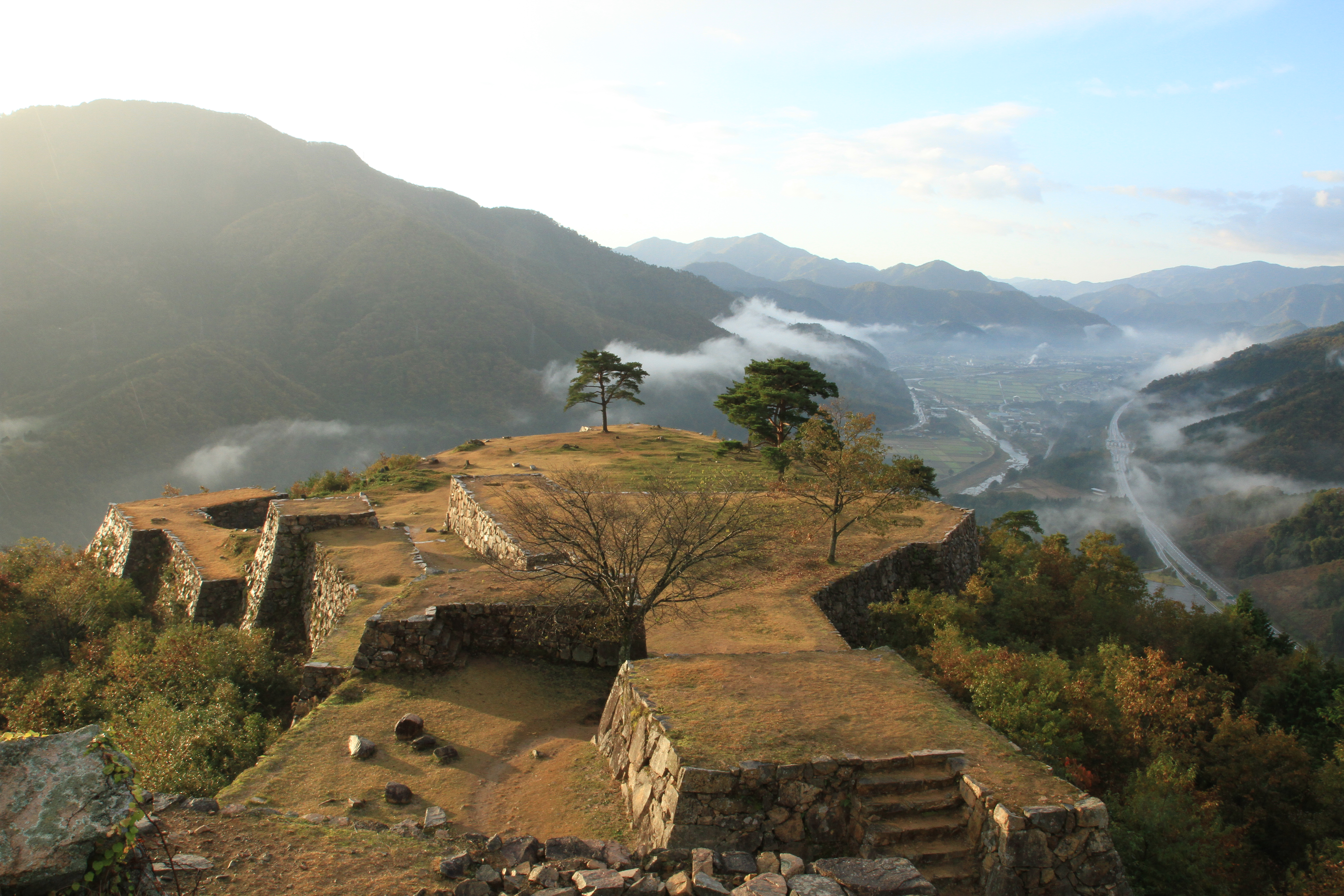 竹田城